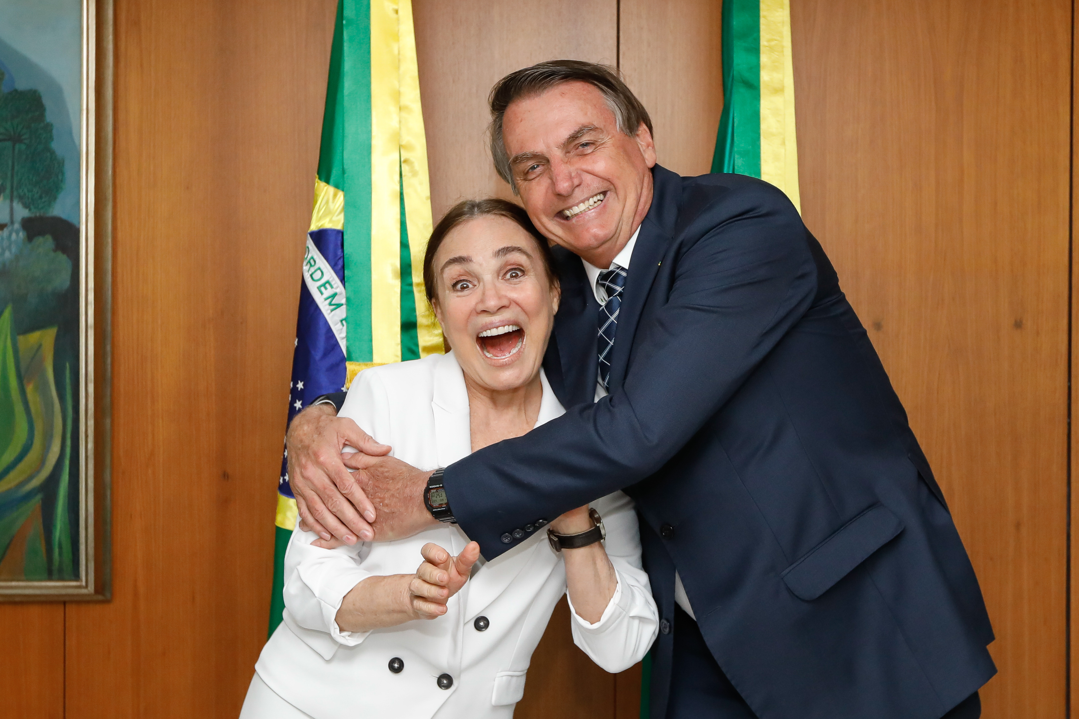 (Brasília - DF, 22/01/2020) Presidente da República Jair Bolsonaro durante encontro com Regina Duarte Foto: Carolina Antunes/PR/